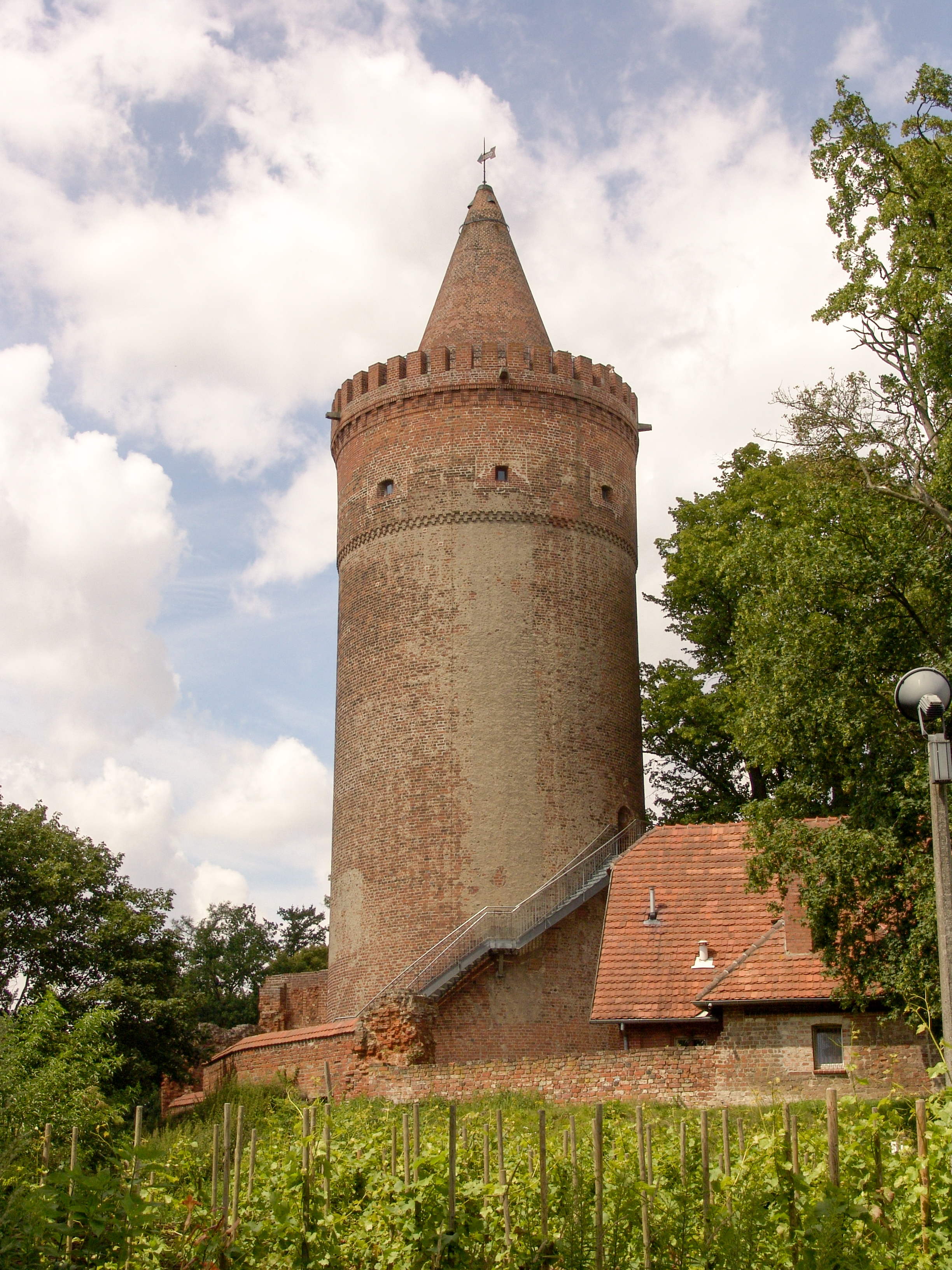 Burg Strargard